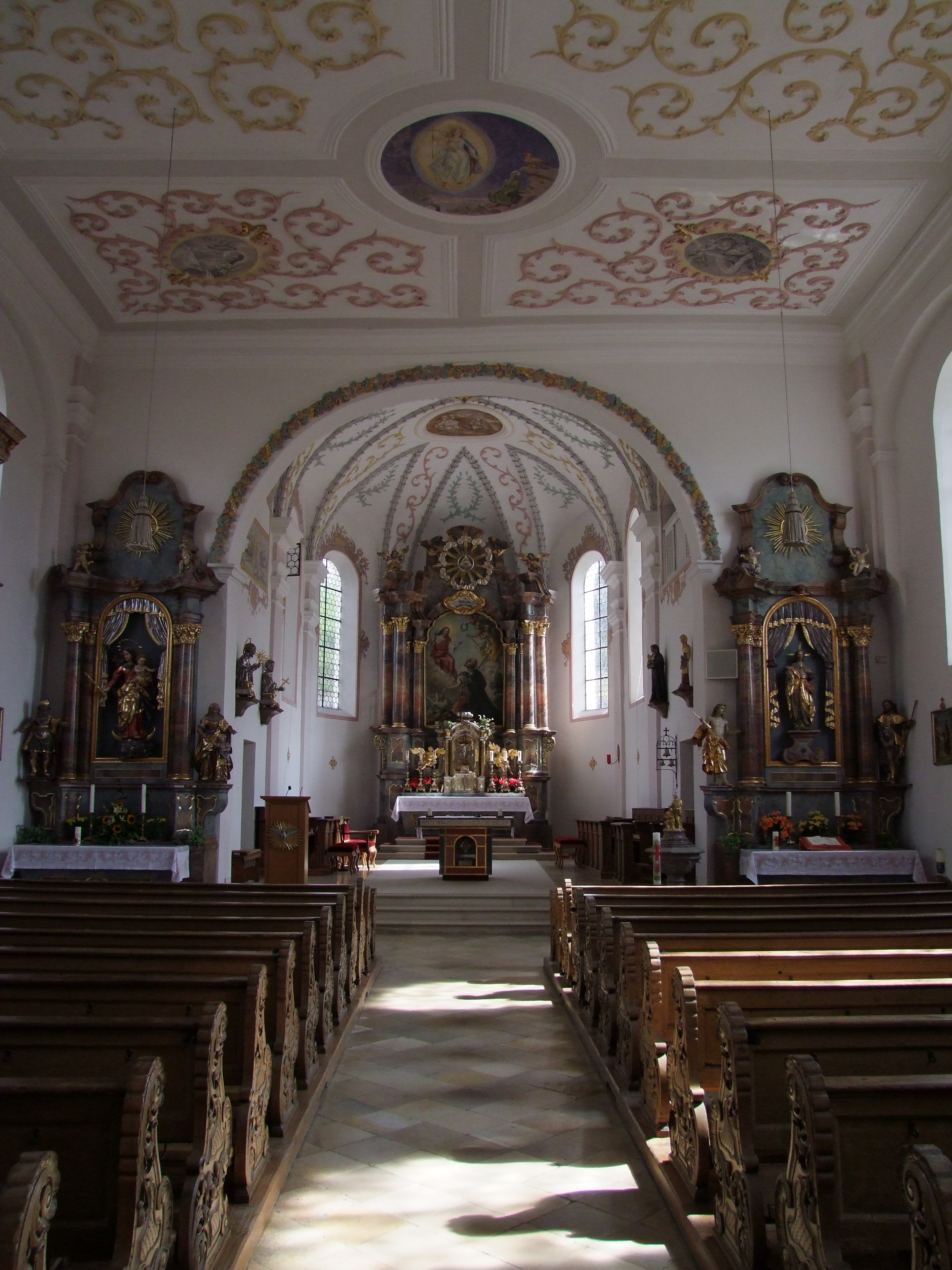 St. Jakobus der Ältere im oberschwäbischen Mindelau, einem Ortsteil der Stadt Mindelheim in Bayern/Schwaben